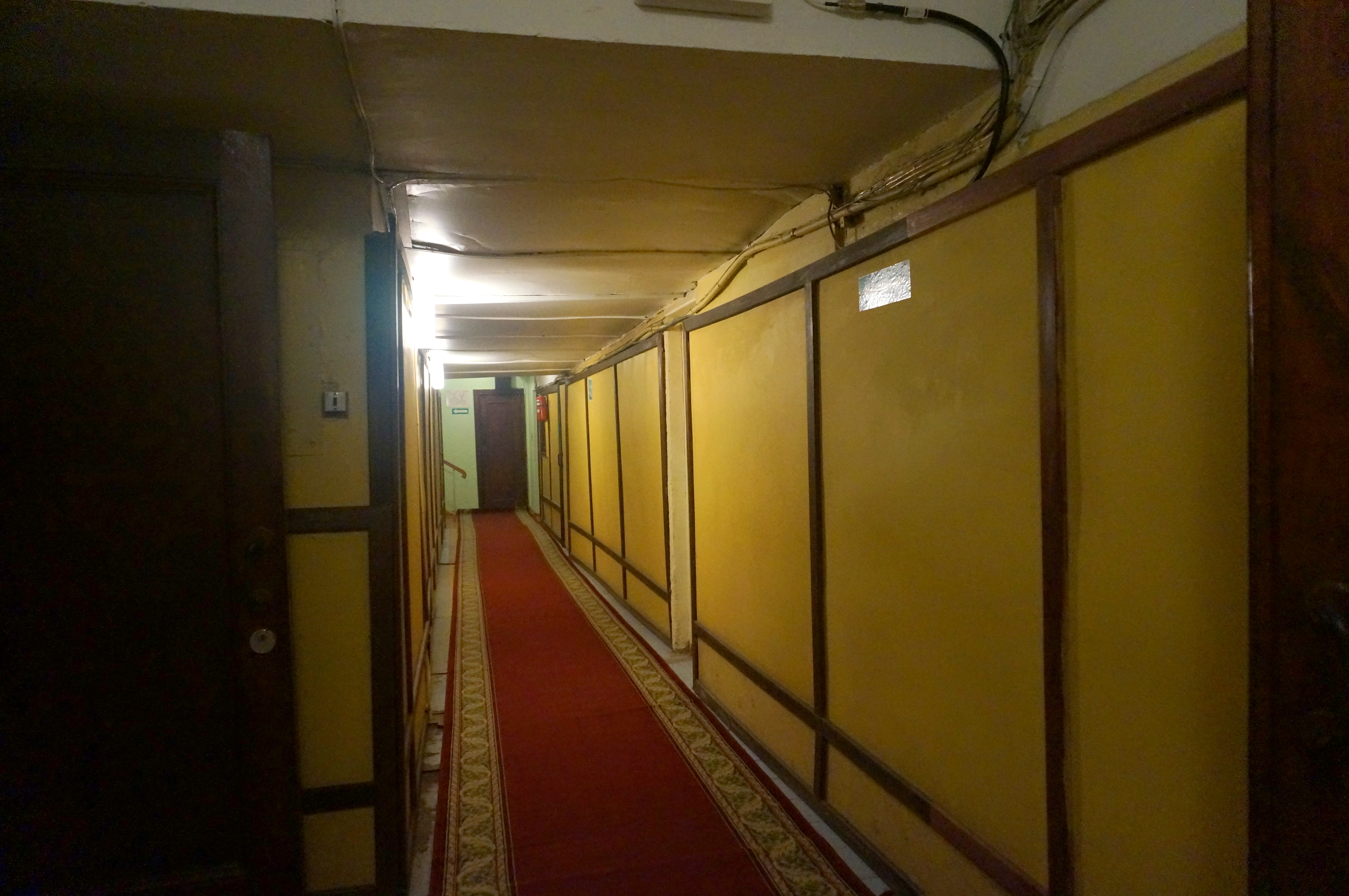 Коридор на 1 этаже бункера Сталина. -34 метра от уровня земли. Самара